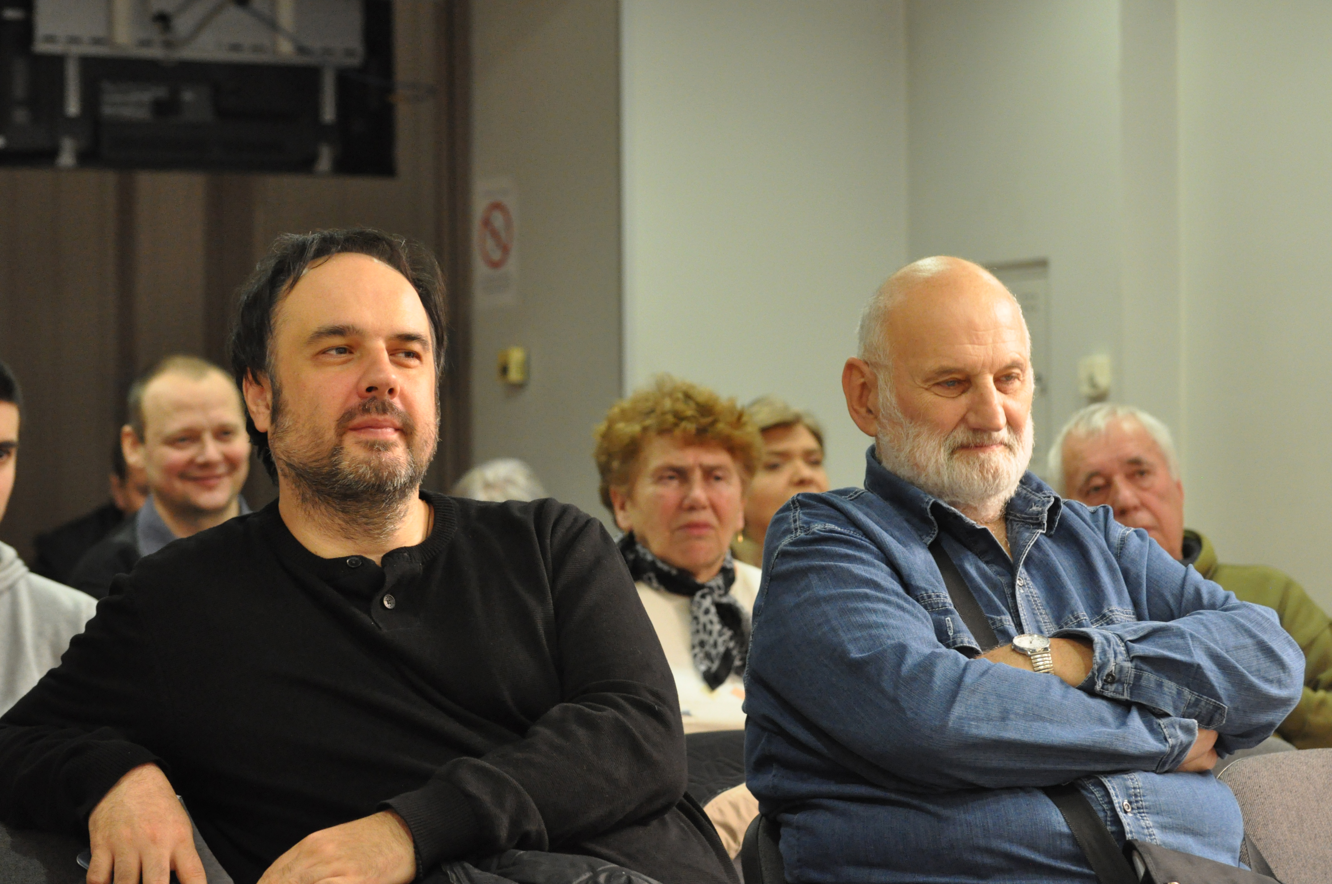 Небојша Илић Циле српски глумац и Зоран Симјановић српски композитор